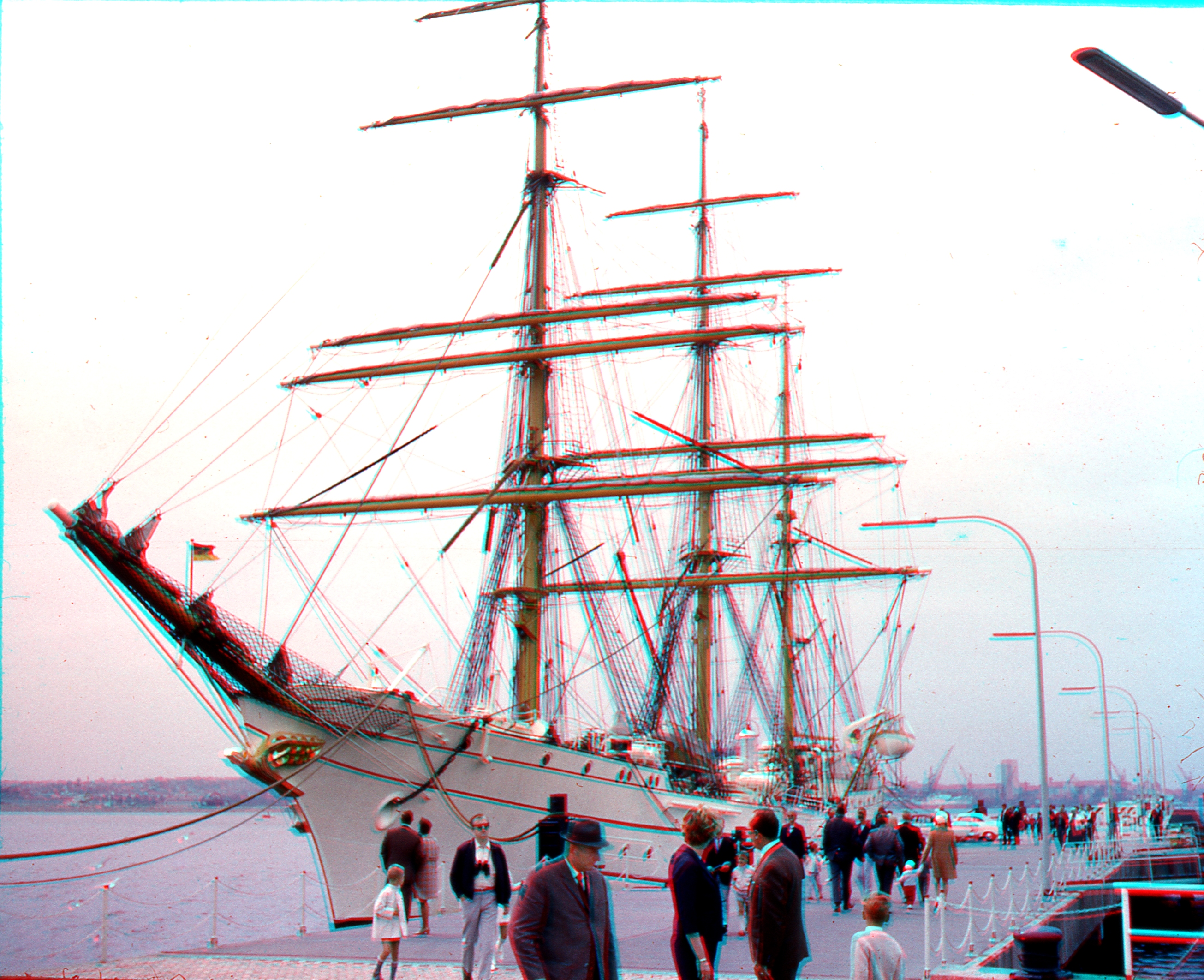 Gorch Fock in Kiel 1968